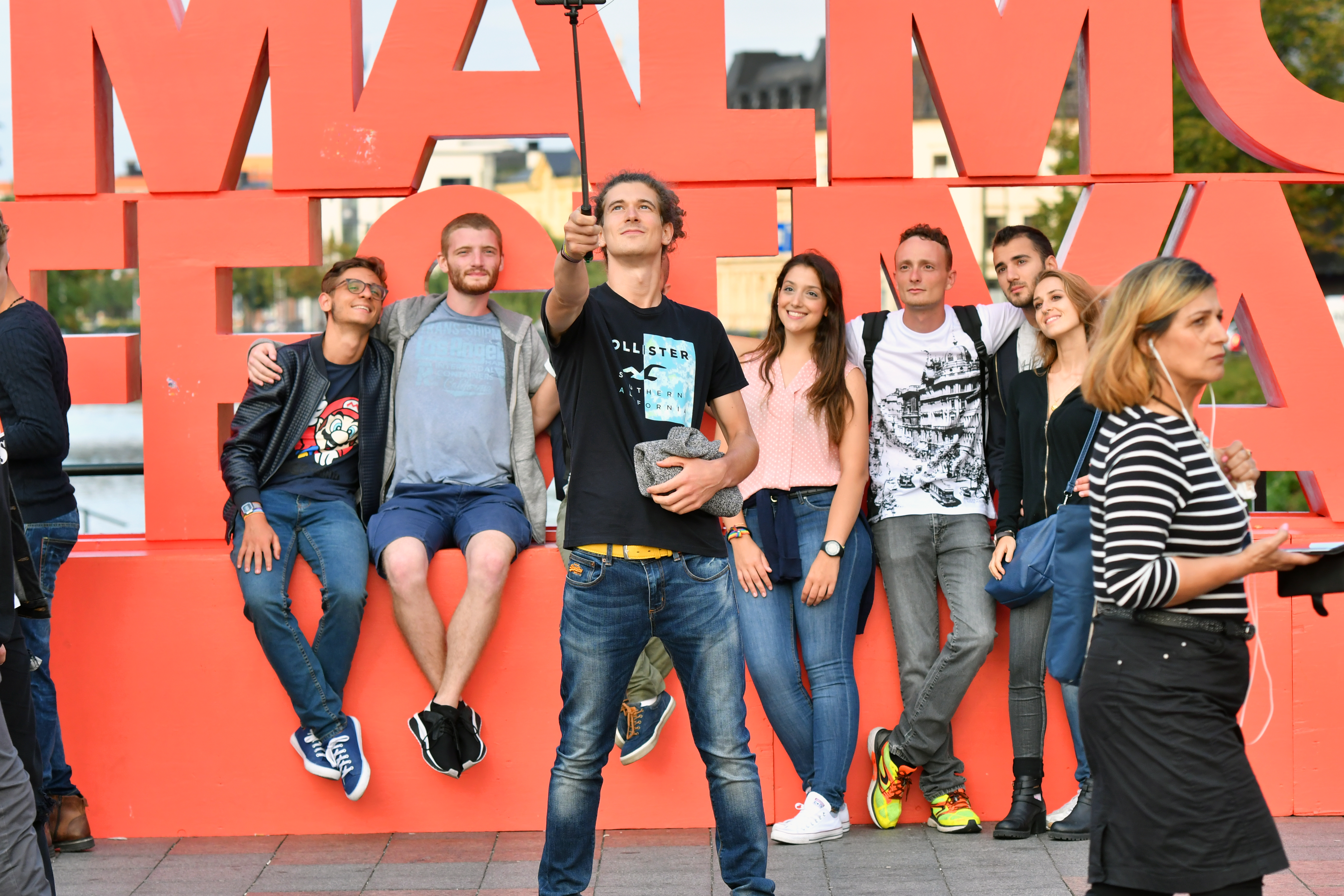 Folkvimmel på Malmöfestivalen.